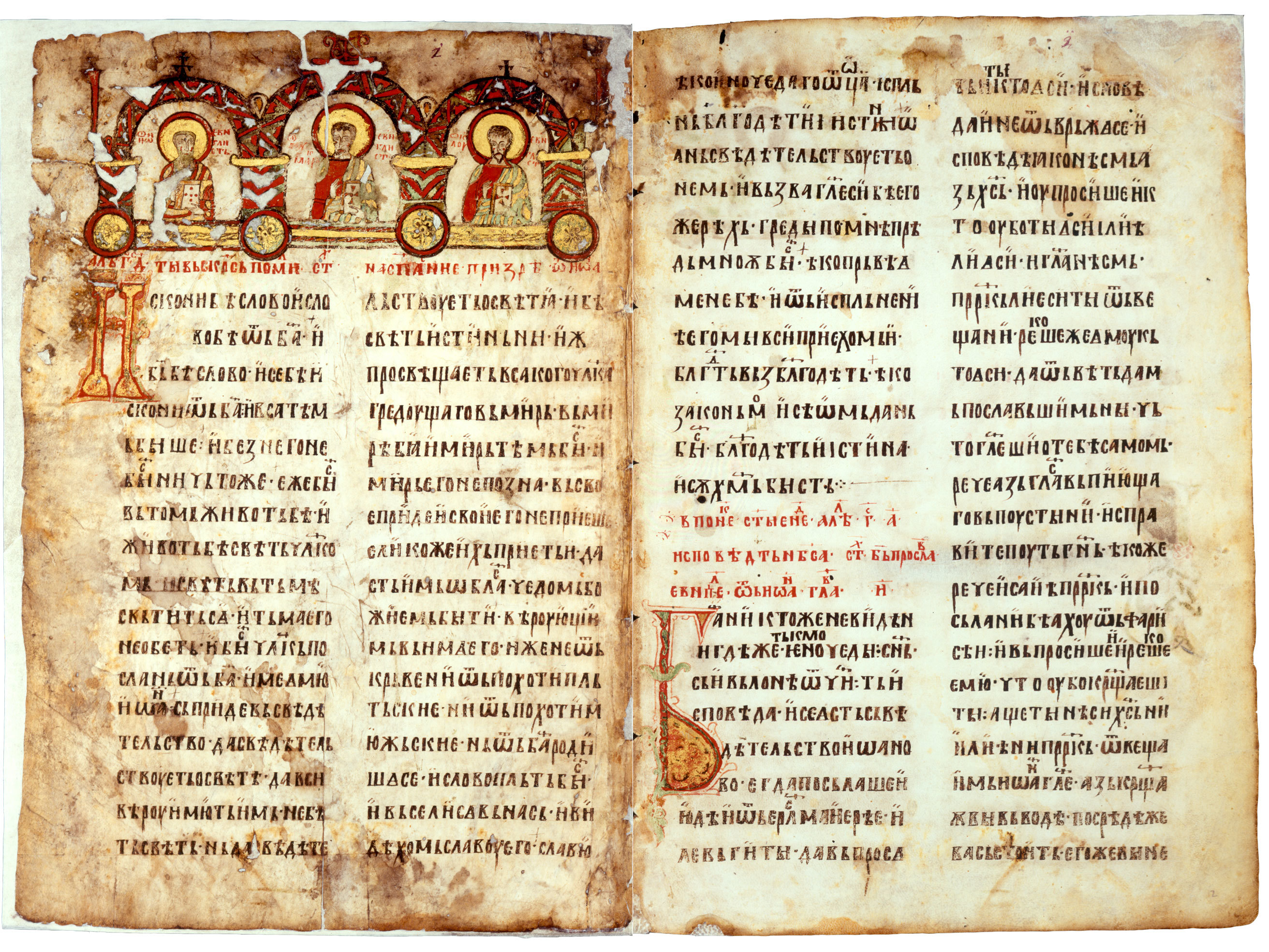 Miroslav's Gospel, pages 1 & 2.